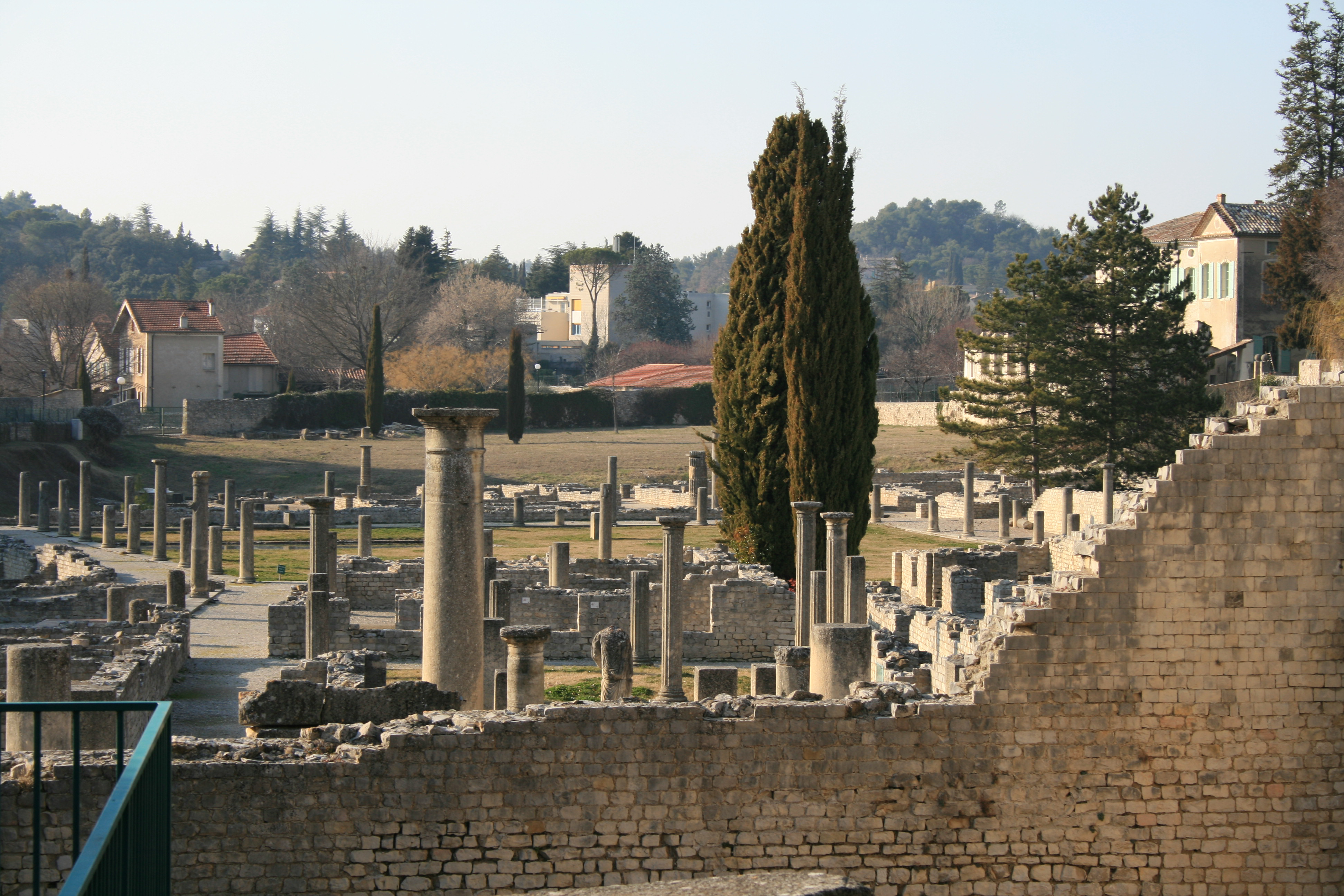 La Villasse